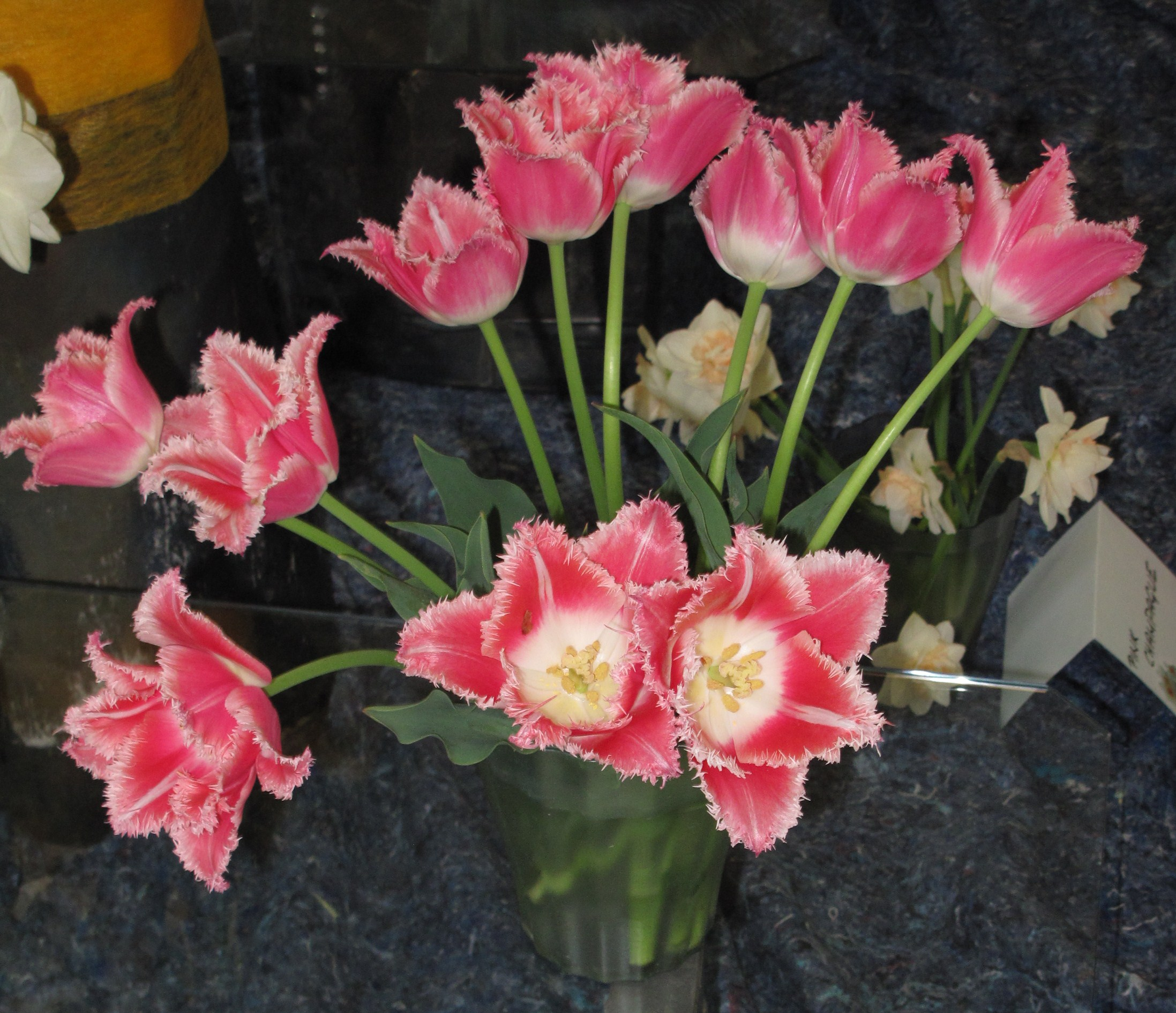 Kultivar 'Bell Song' rodu Tulipán (Tulipa). Veletrh Narcis 2016, Lysá Nad Labem, Česká republika.